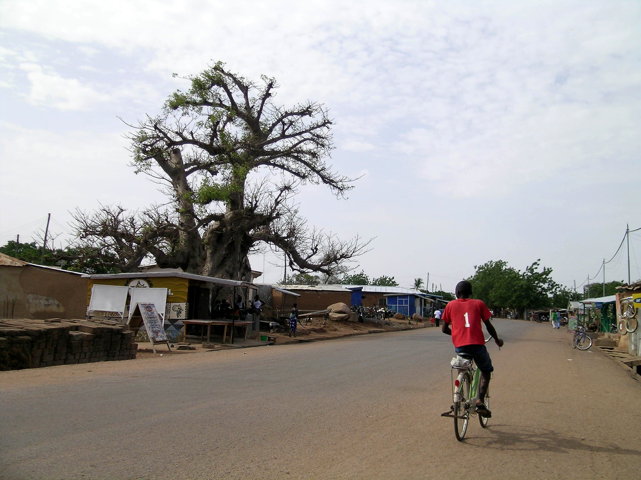 Street in Bolgatanga, Ghana